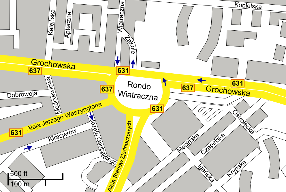 Poland, Warsaw, Rondo Wiatraczna, Praga Południe